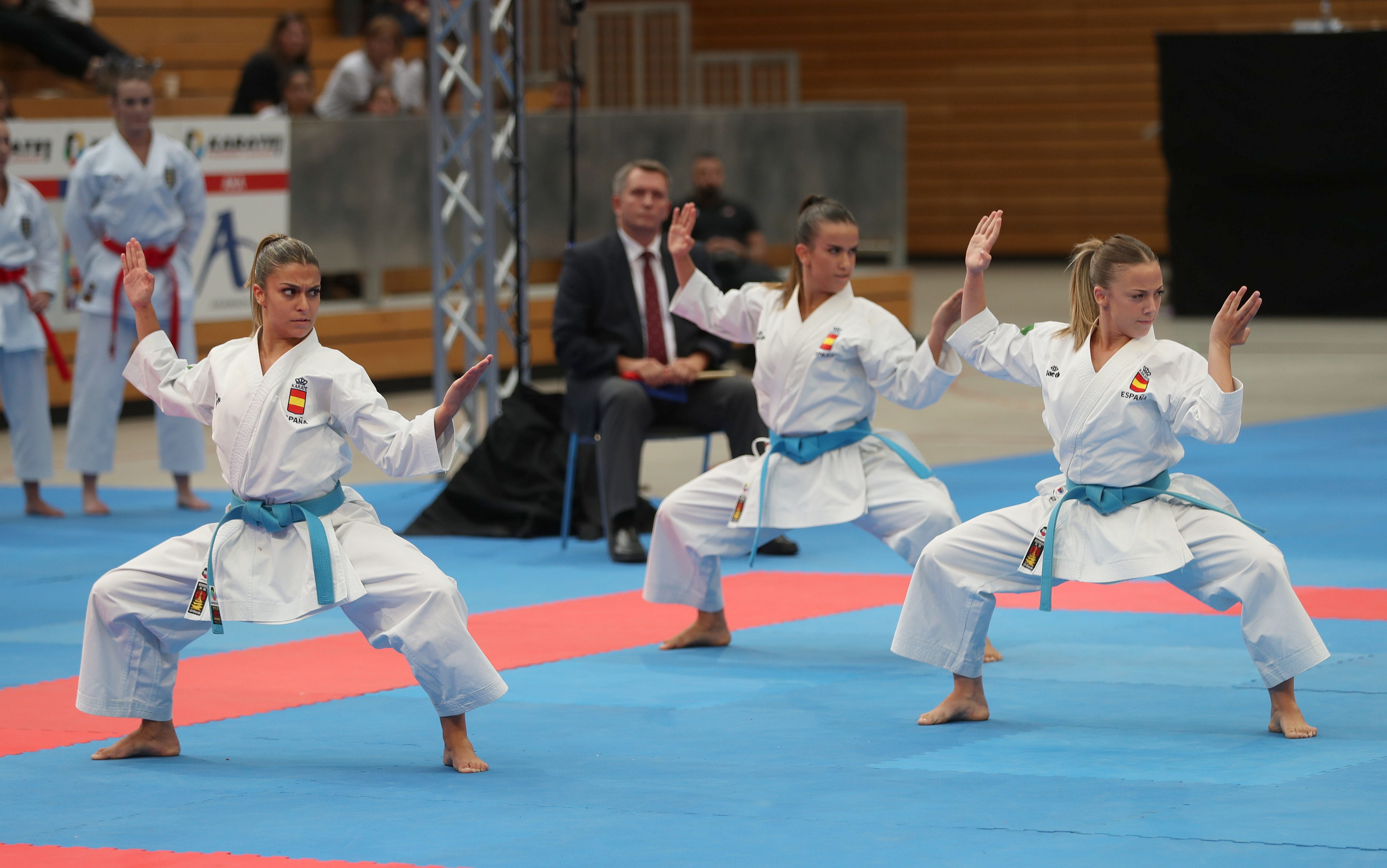 Female Team Kata am 16. September 2018 in der Karate1 Premier League Berlin 2018.